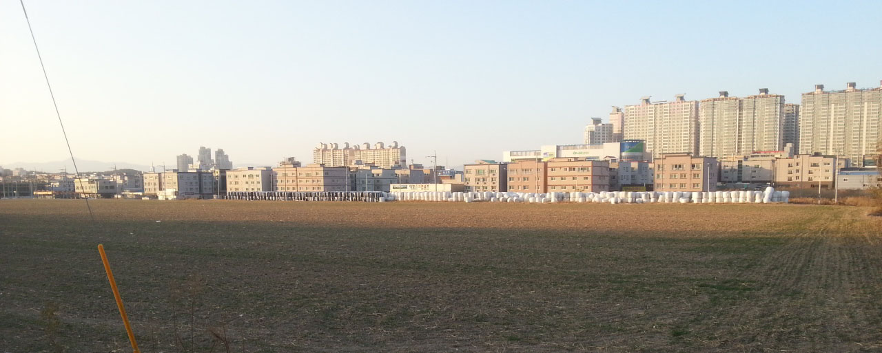 포항시 양덕동 일부 주거단지